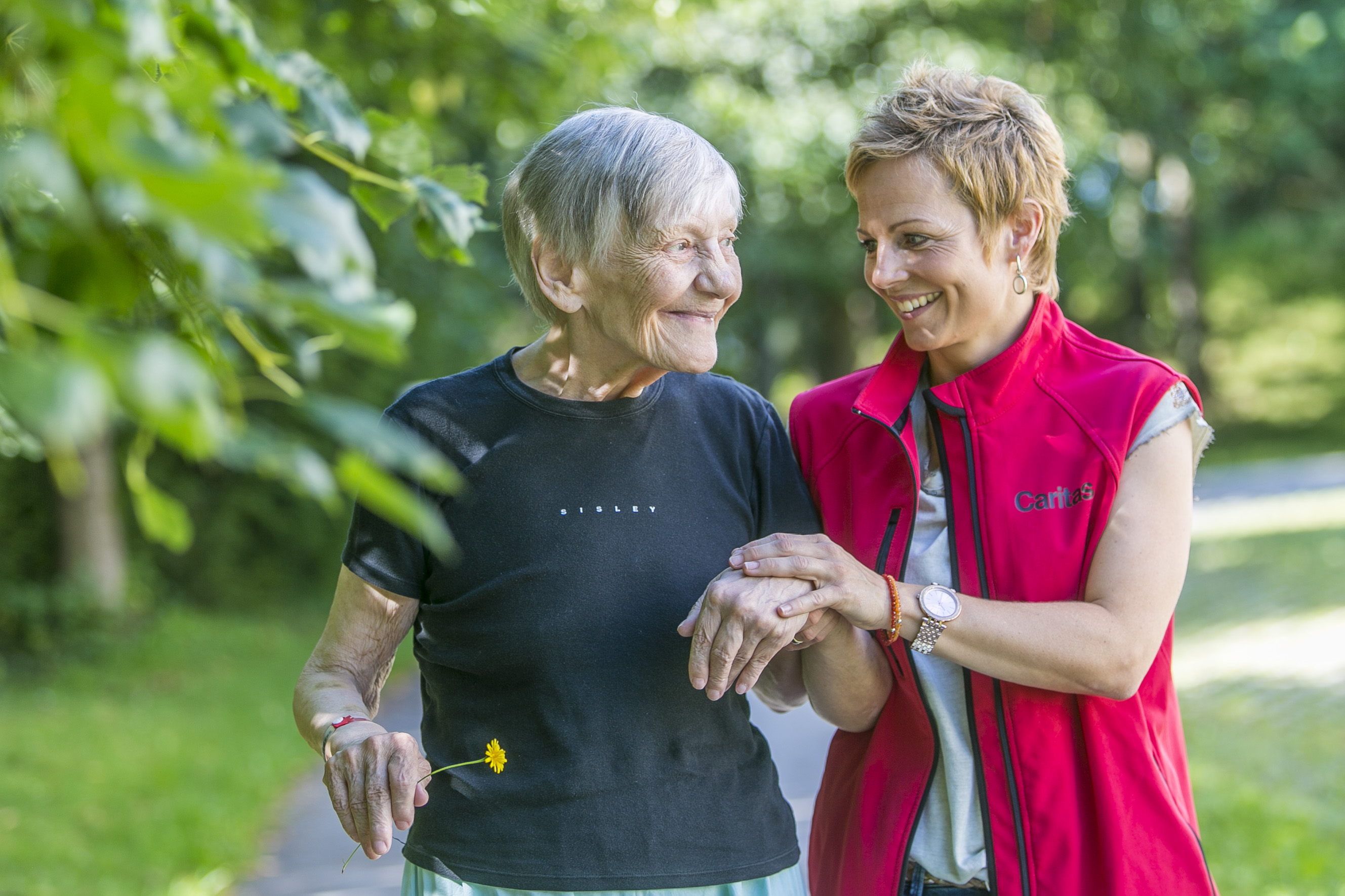 Besuchsdienst der Caritas auf der Geriatrie des Uniklinikums Salzburg / Christian-Doppler-Klinik.